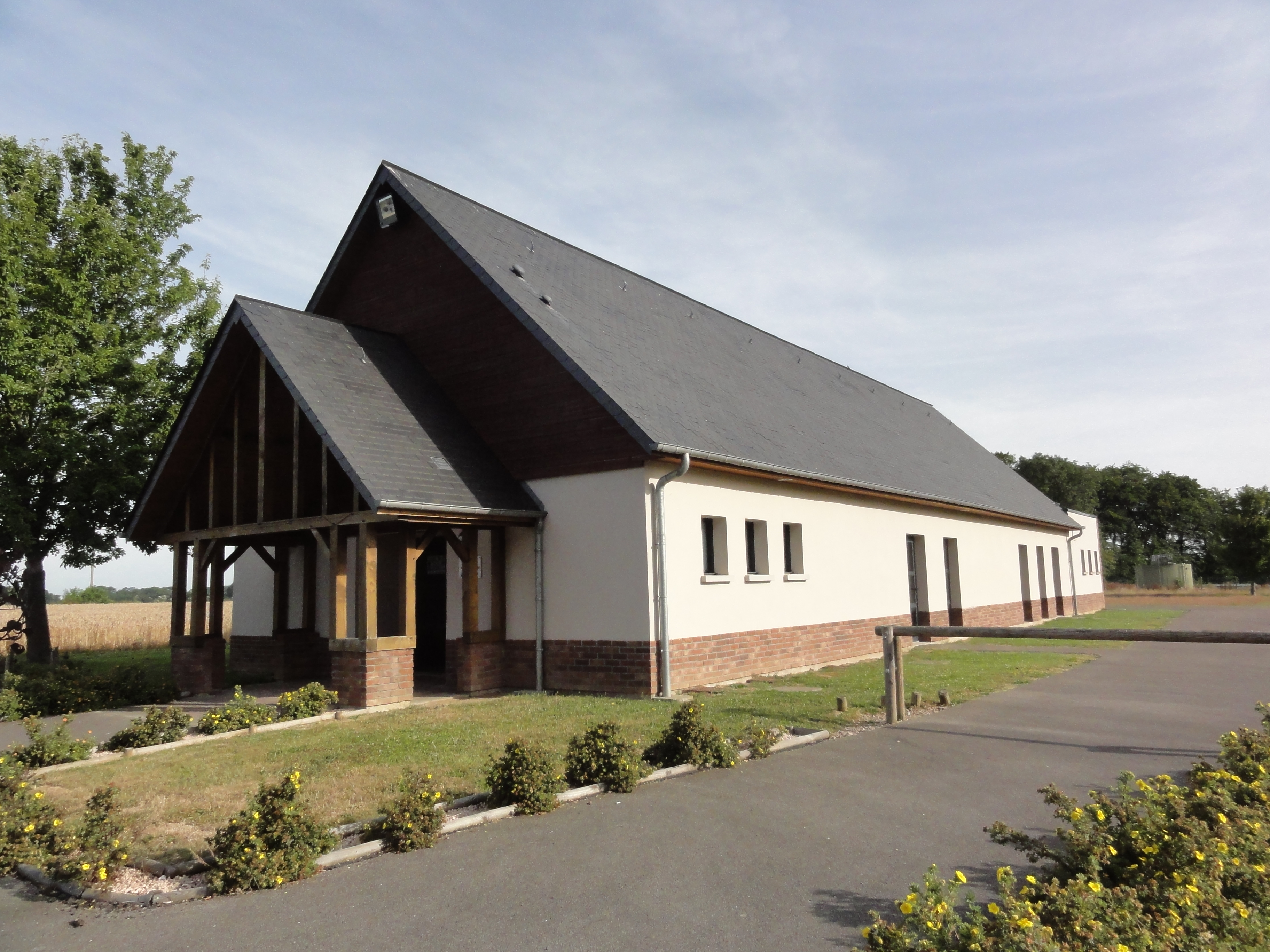 Sainte-Marguerite-sur-Fauville (Seine-Mar.) Salle communale René de Saint-Delis